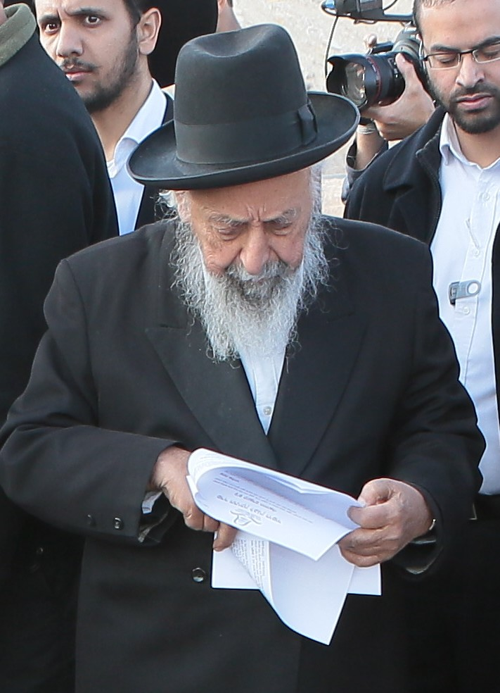 הרב שמעון בעדני